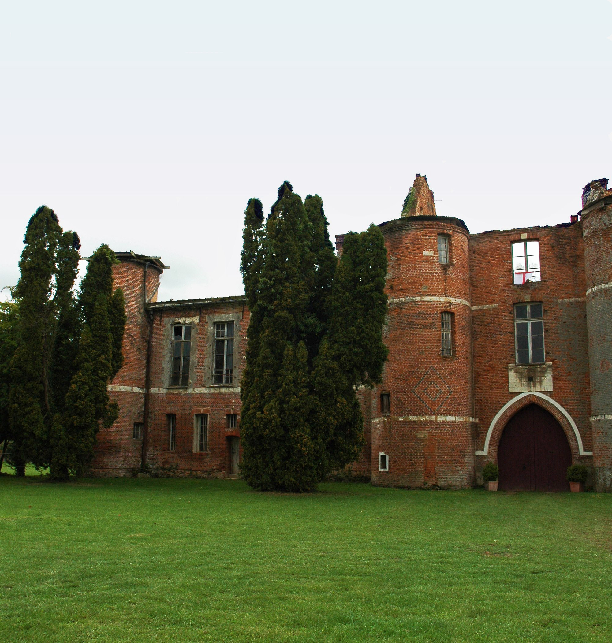 Le château de Beaucamps-le-Jeune, Somme, Picardie, France